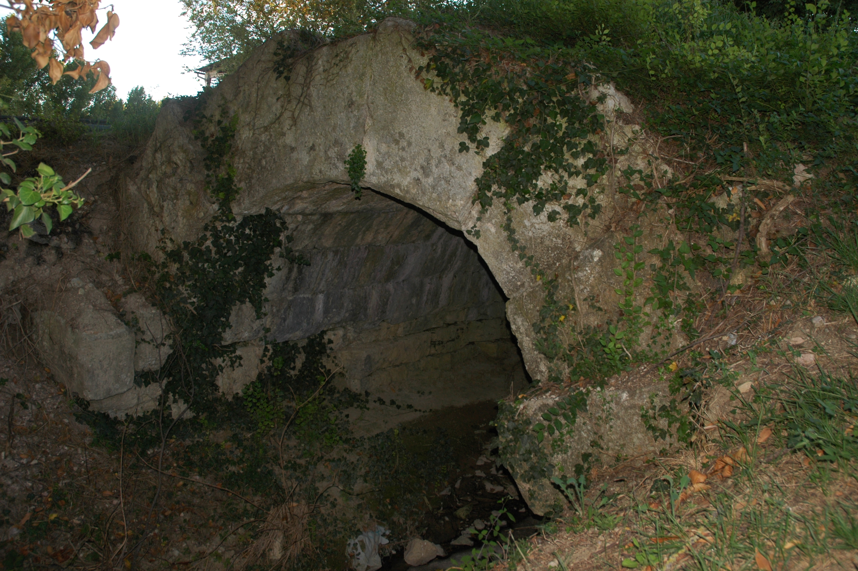 c.d. Ponte del Diavolo in località Cavallara di Gualdo Cattaneo manufatto romano risalente al tracciato primigenio della Via Flaminia probabilmente 220 a.C.